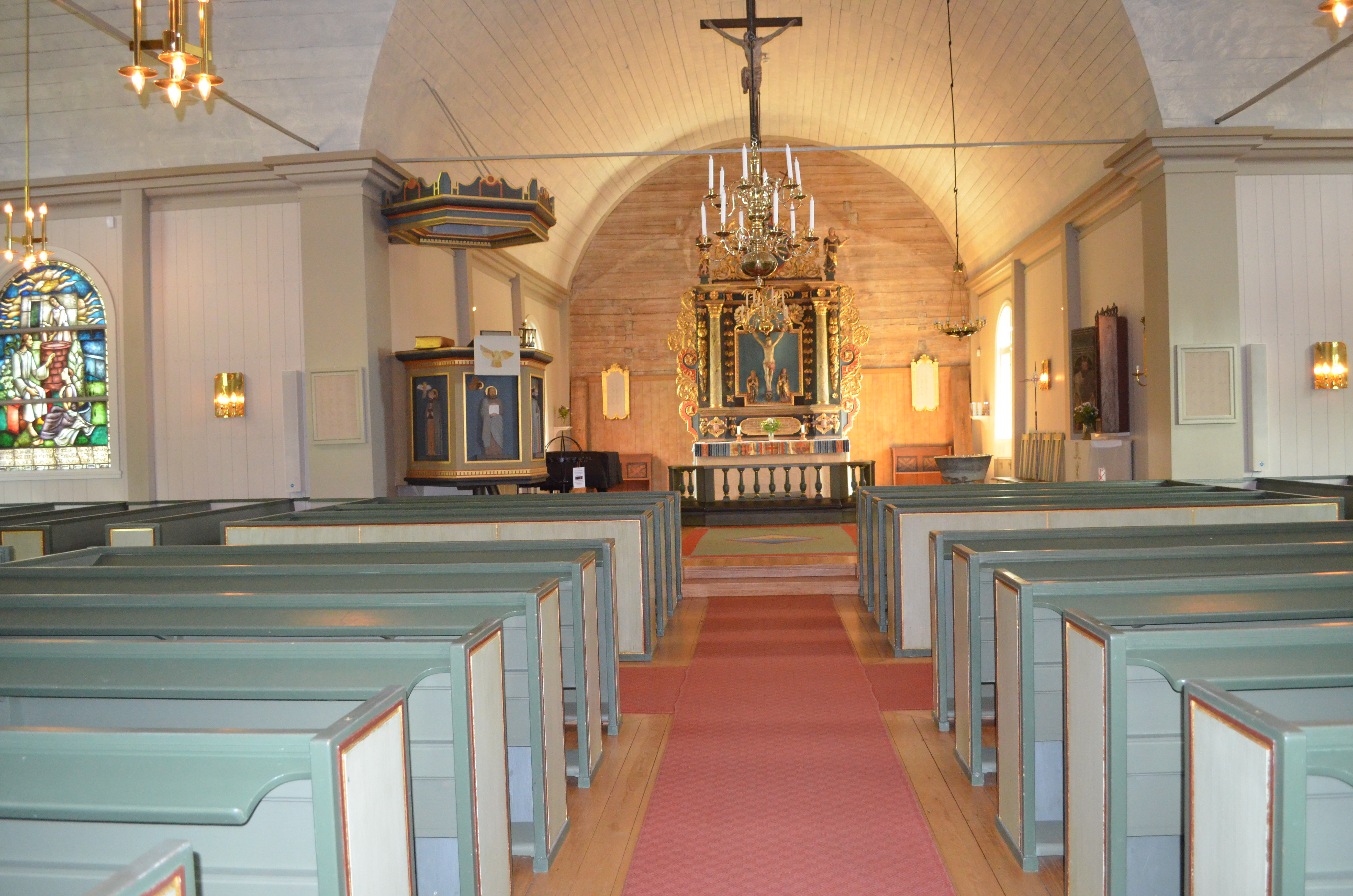 Hammarö kyrka kyrkorummet 2017